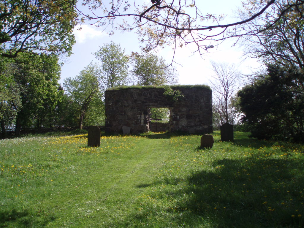 Kyrkoruinen sedd från ingången.